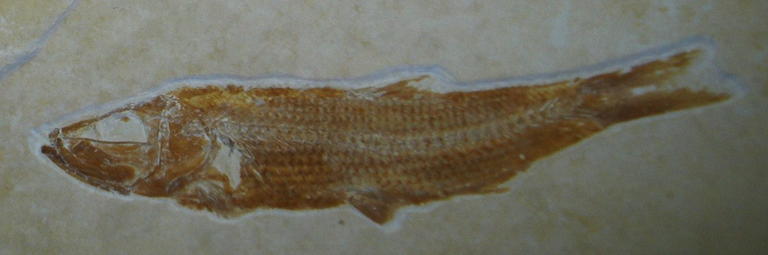 Fossil of Ascalabos, an extinct fish- Took the photo at Fossil Show, Munchen 2011